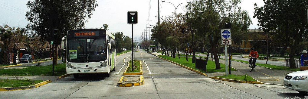 Un largo viaje hizo este bus recorrido 506 para llegar hasta aquí desde Maipú. Detrás se ve parte del camino. Av. Grecia esquina el Acueducto, Peñalolén, Región Metropolitana, Chile.